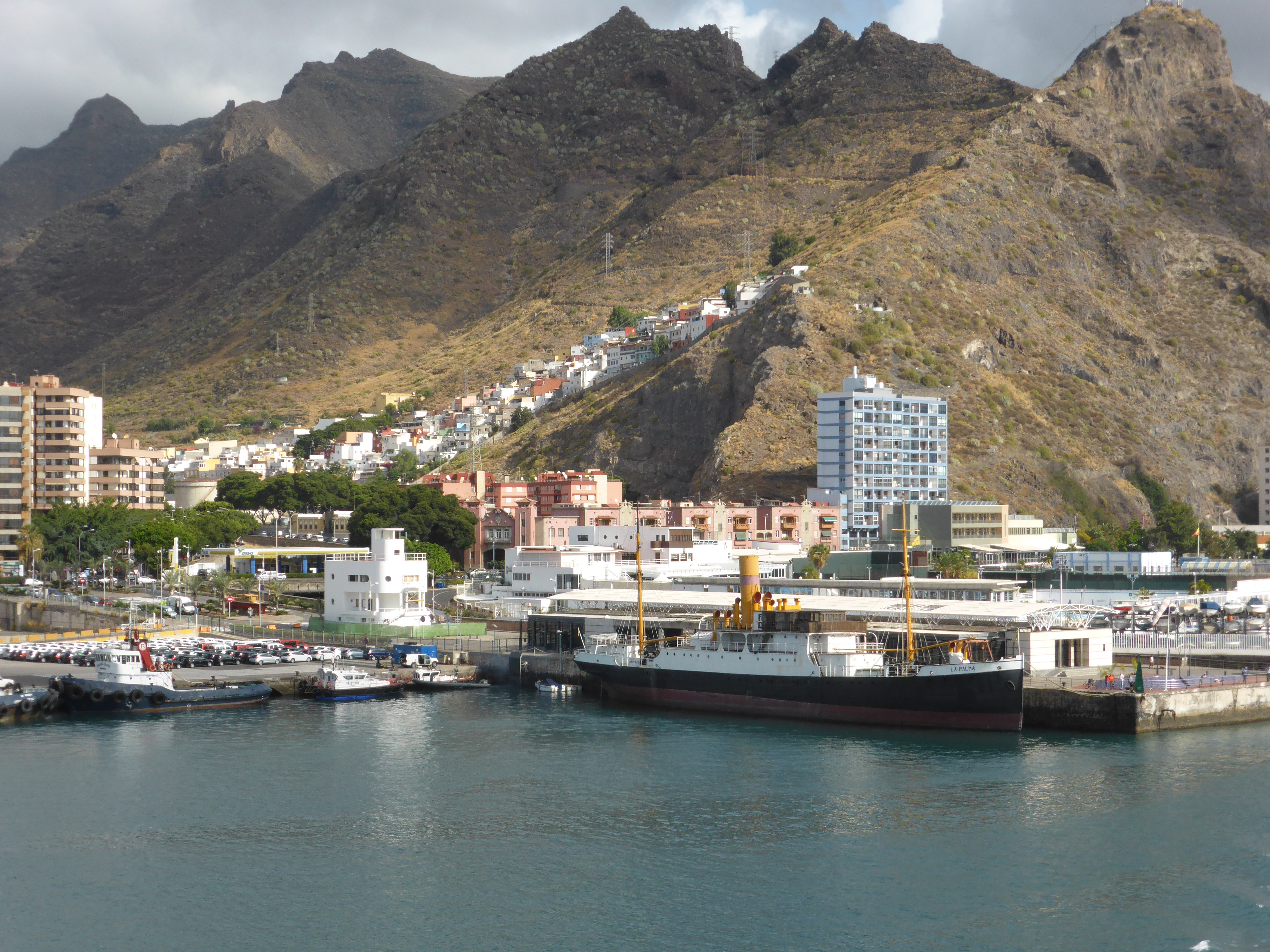 Vista tomada desde la cubierta de un ferry, entrando en el puerto de Santa Cruz de Tenerife. Al fondo vemos montañas del macizo de Anaga, y a la derecha la montaña de Paso Alto. Delante, atracado permanentemente en el Muelle Norte, se encuentra el centenario vapor "La Palma", un correíllo interinsular canario, construido en el año 1912.